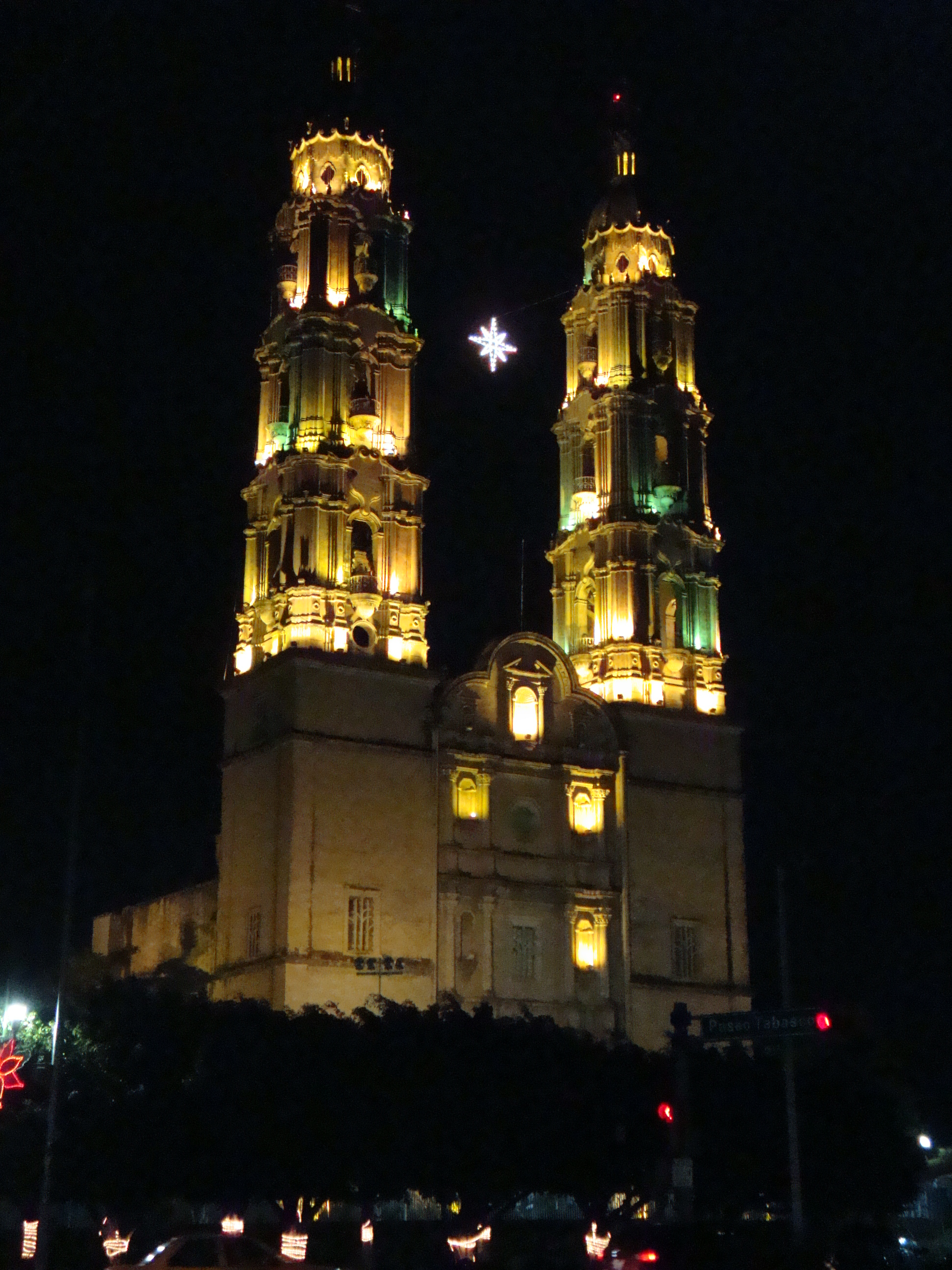 Vista nocturna de la Catedral de Villahermosa, Tabasco